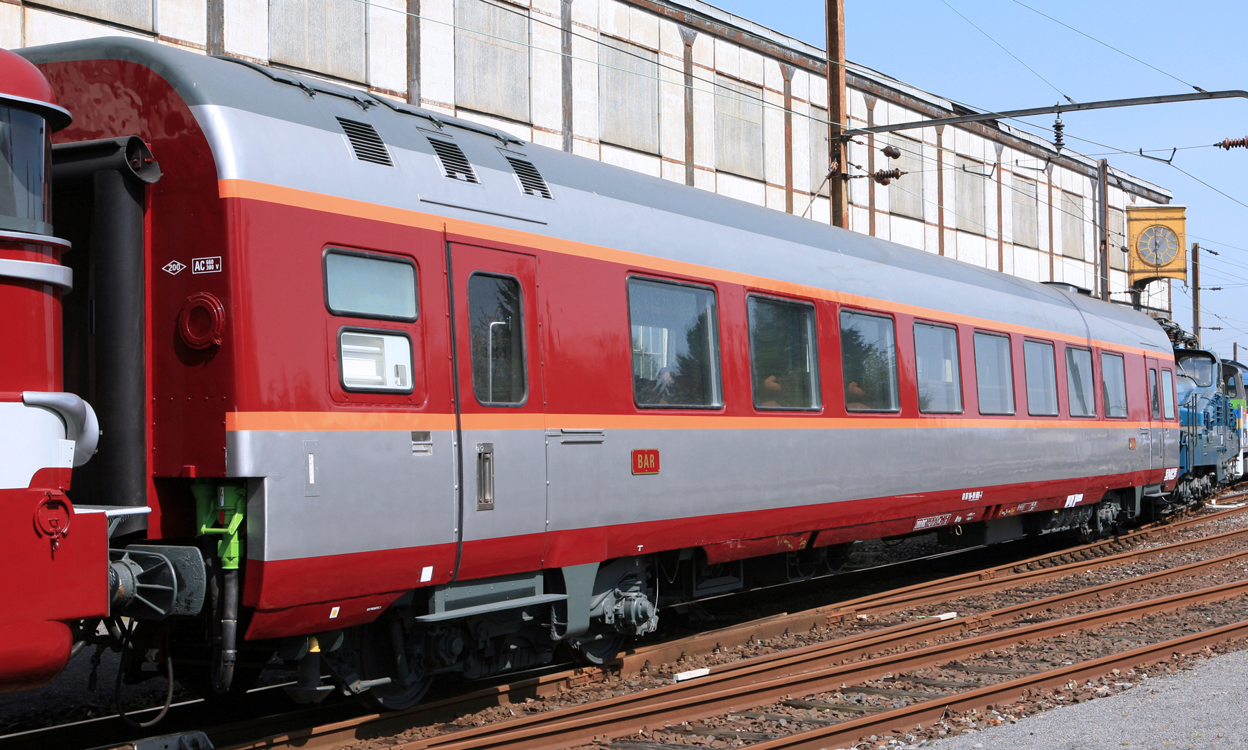 A3RTU Cite du Train